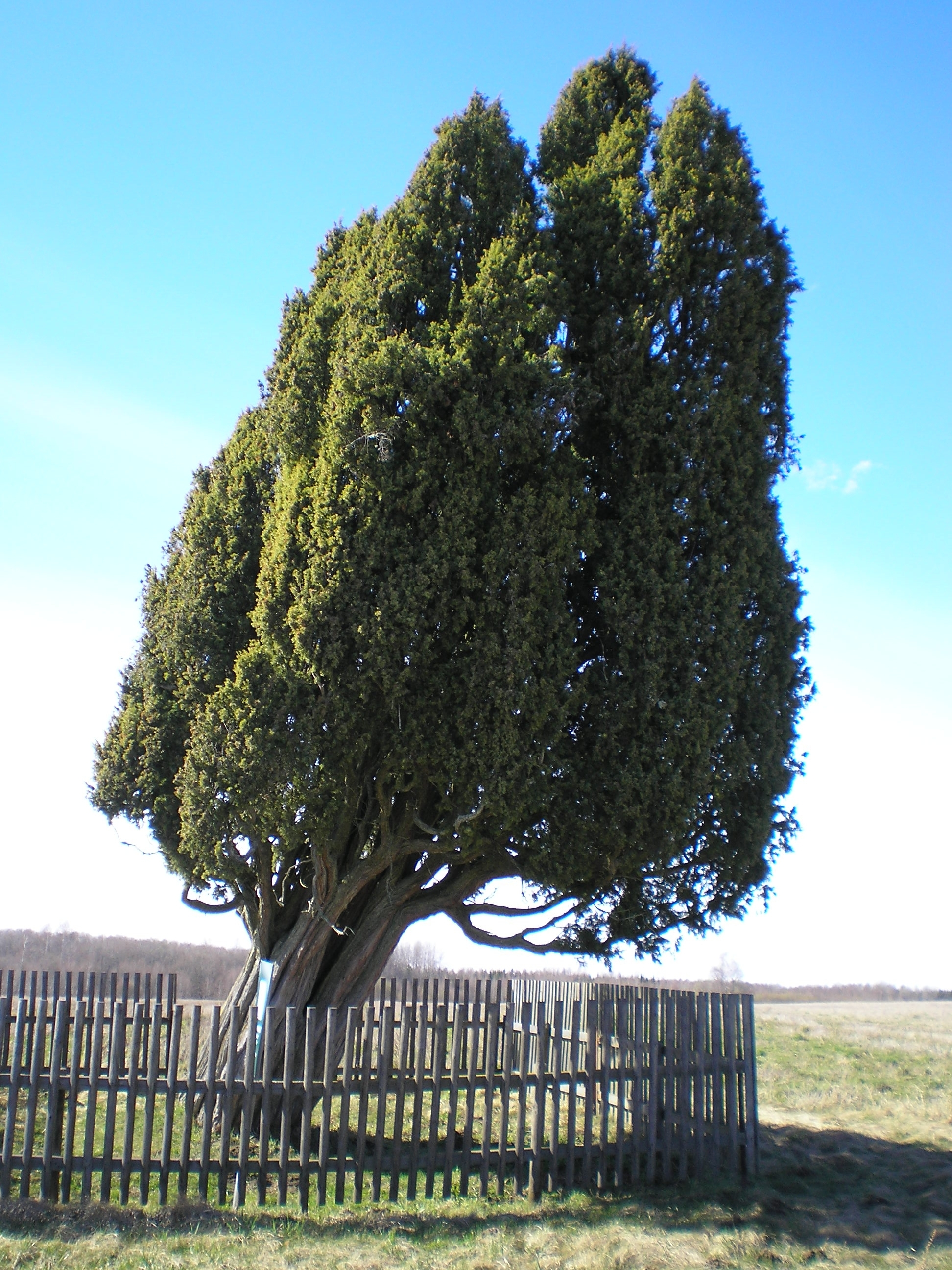 Rietekļa (Baložu) kadiķis - Rieteklya juniper